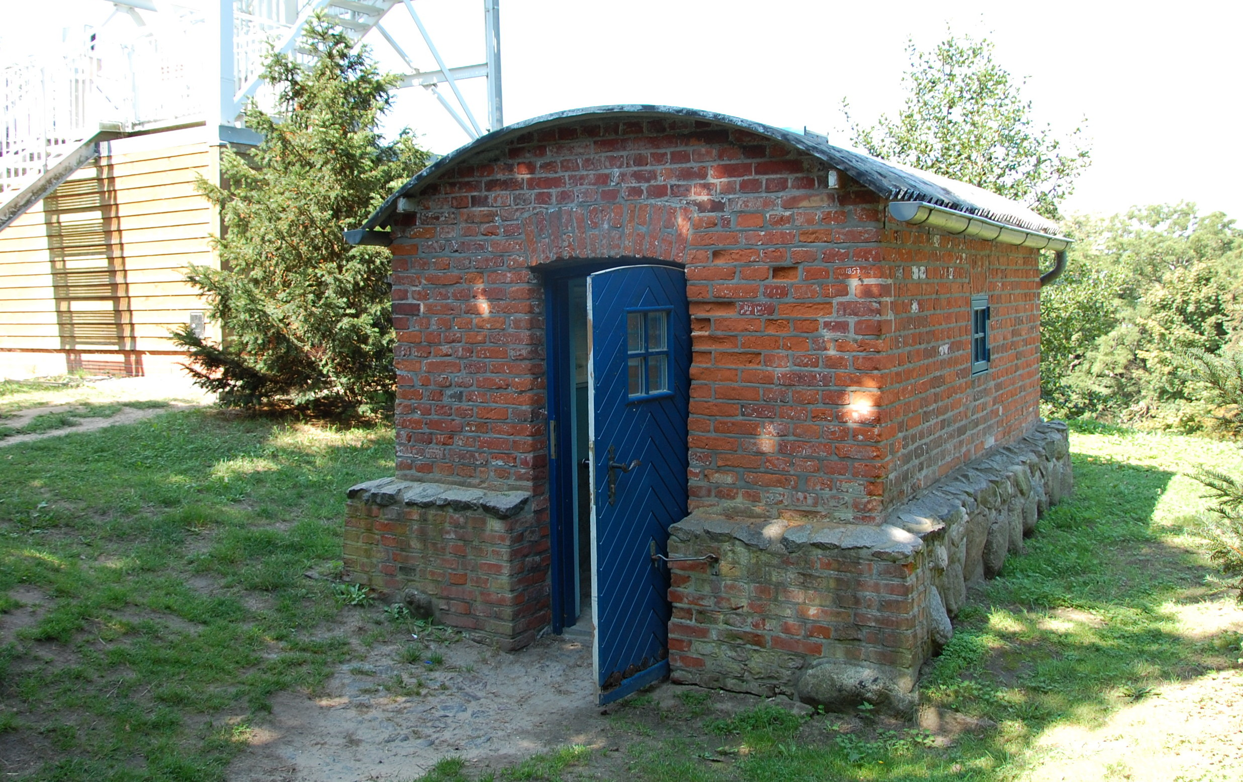 Thiessow Lotsenhaus